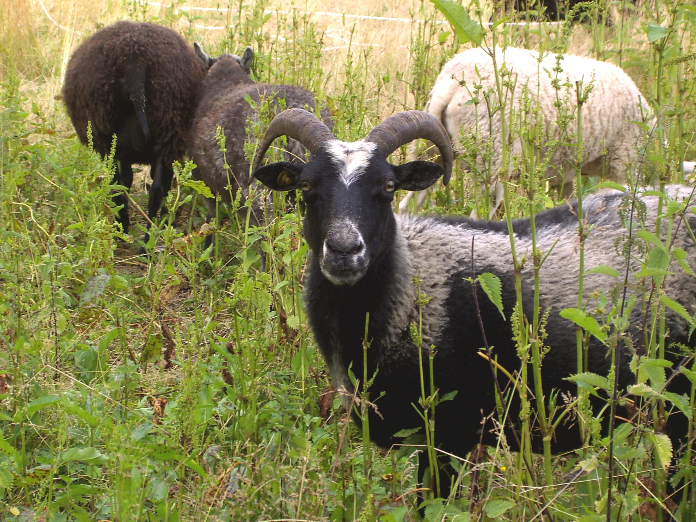 Billede, der efter sigende er Gotlandsk pelsfår. (Se evt. diskussionen på Fildiskussion:Gotland pelsfår2.jpg hvis du ved hvad det er, så sig endelig til. --MGA73 25. maj 2009, 22:14 (CEST))